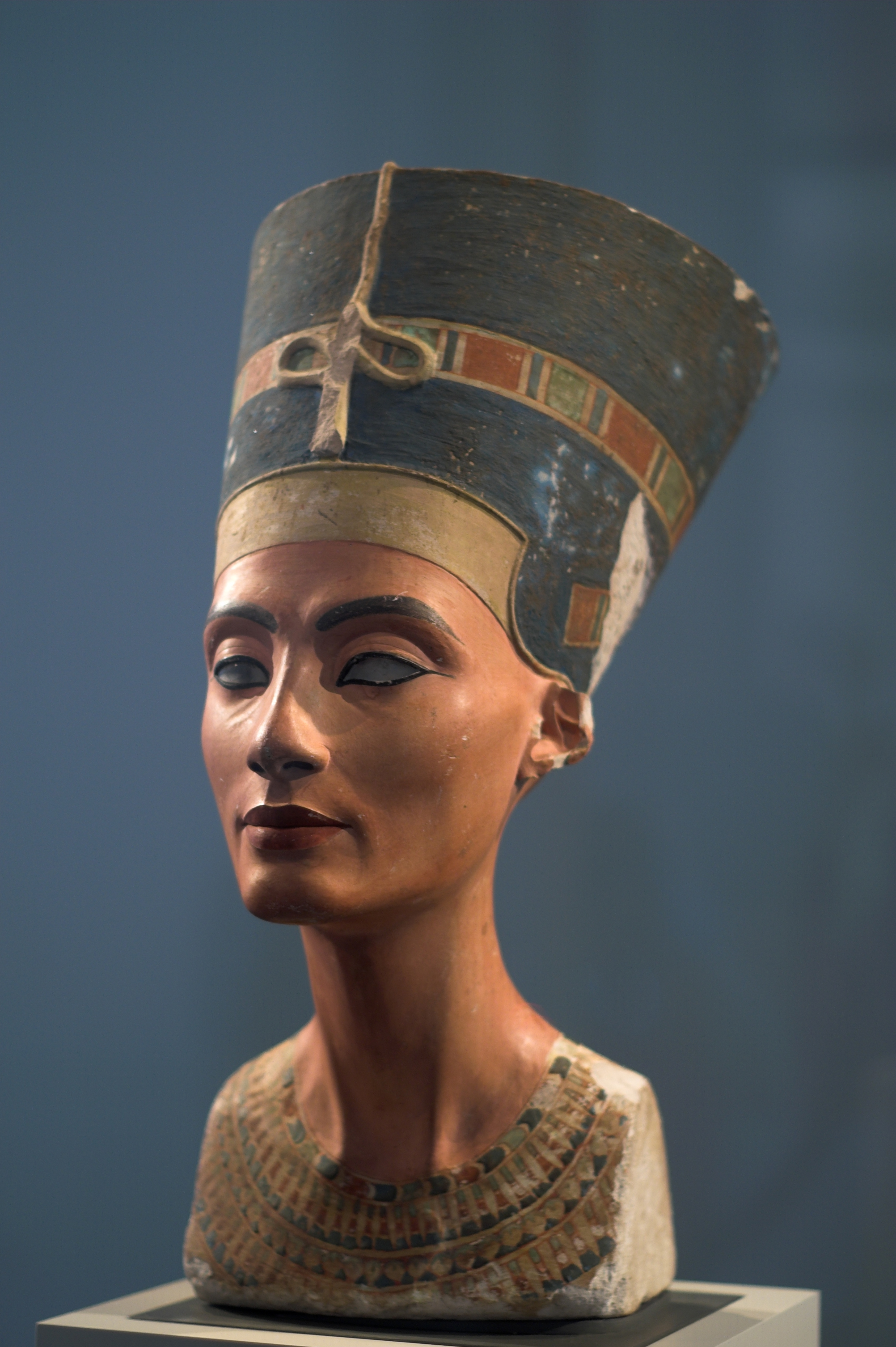 Foto scattata da Angelo Atzei (Angelo73) al museo egizio di Berlino.